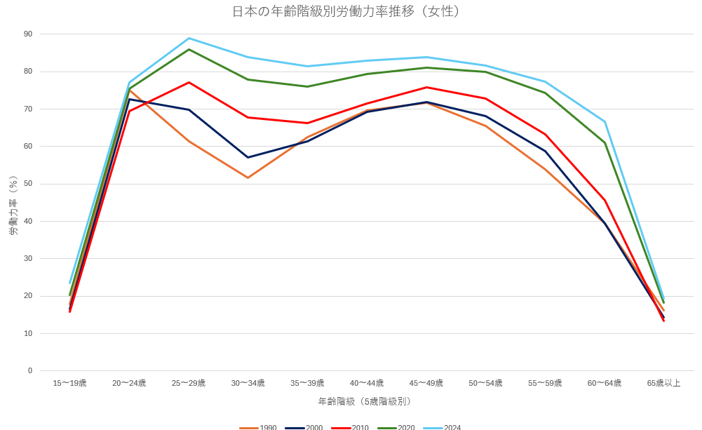 日本の年齢階級別労働力率推移（女性）